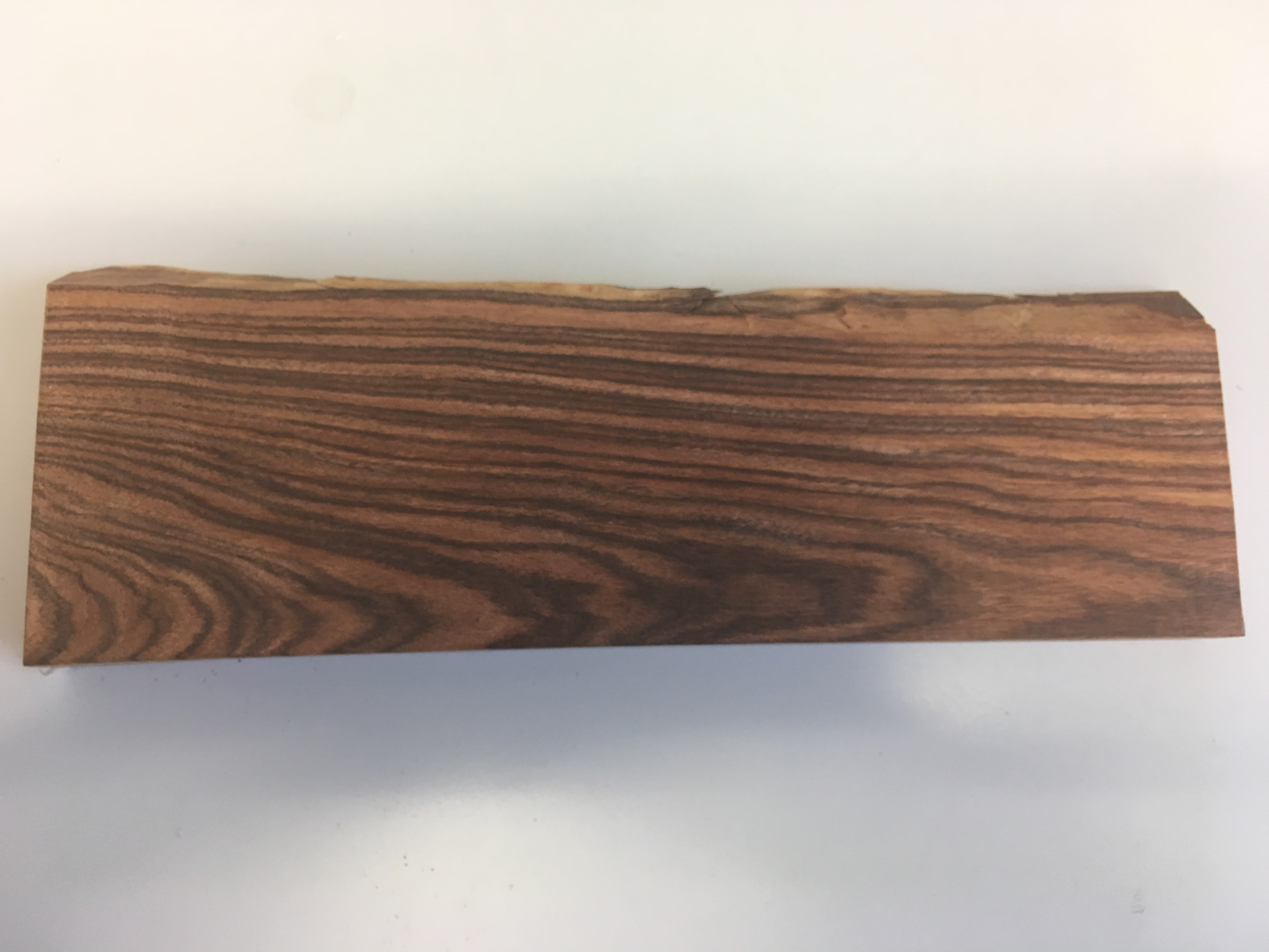 Dalbergia cearensis, Tangentialschnitt